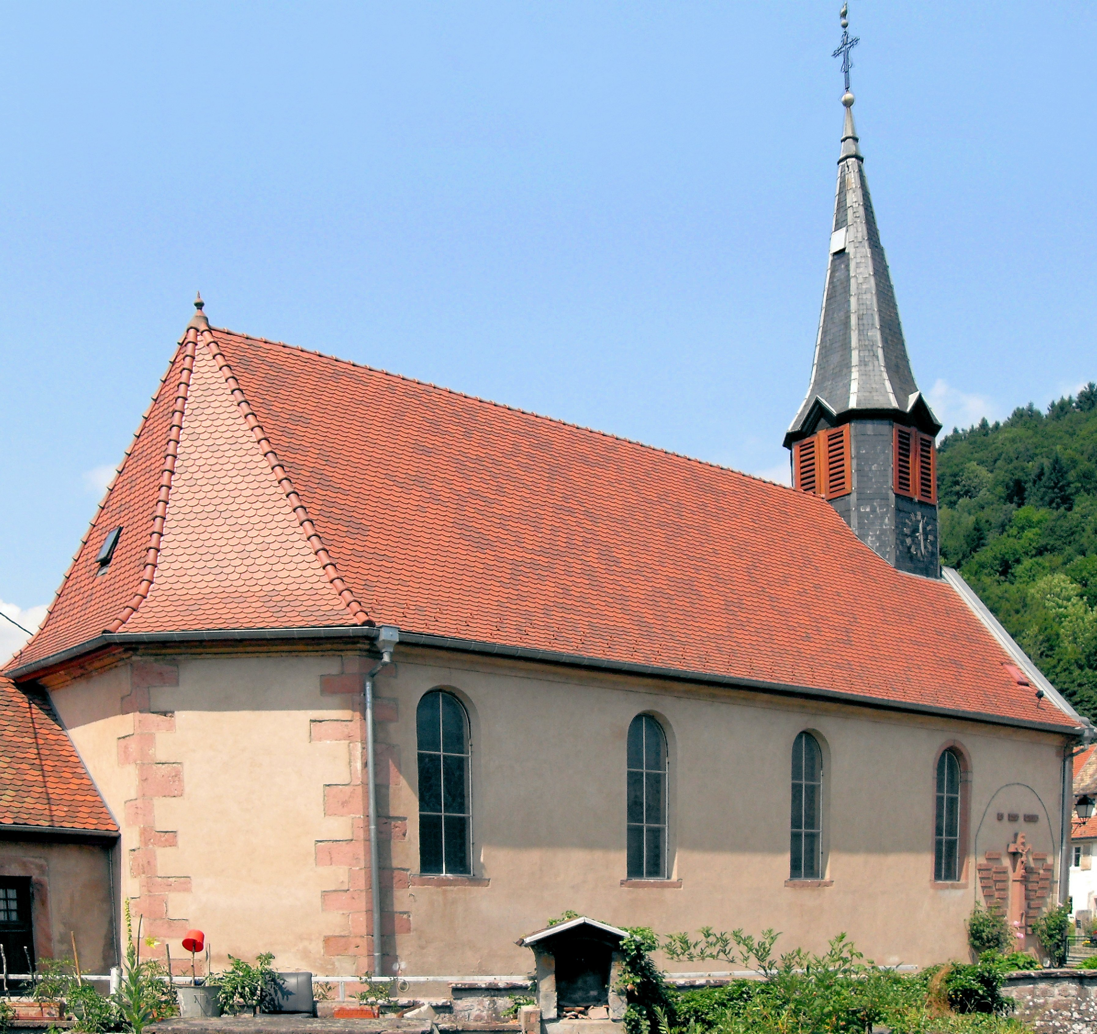 L'église Saint-Quirin de Bassemberg